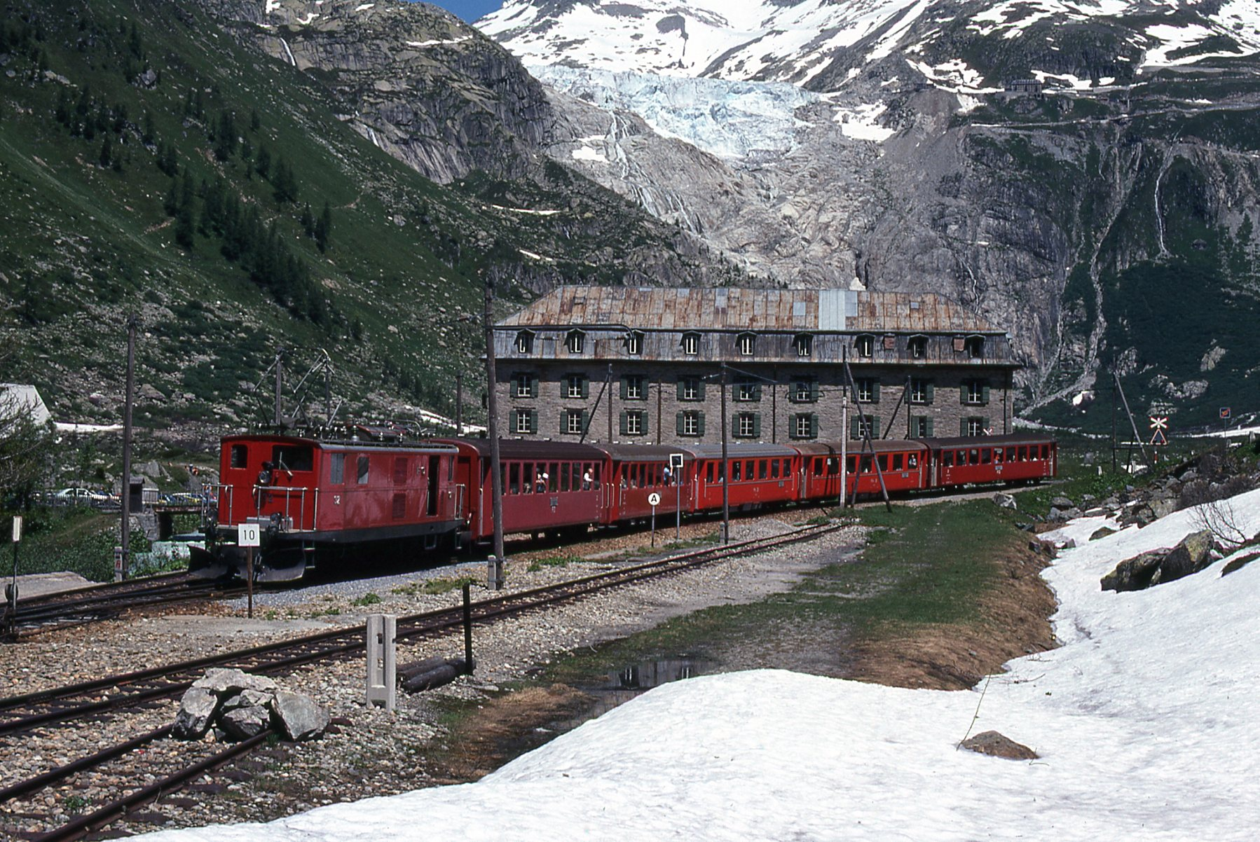 Photo prise dans les années 1970, du temps où le glacier du Rhône était encore important, à ce jour, il ne reste presque plus rien. Dommage.